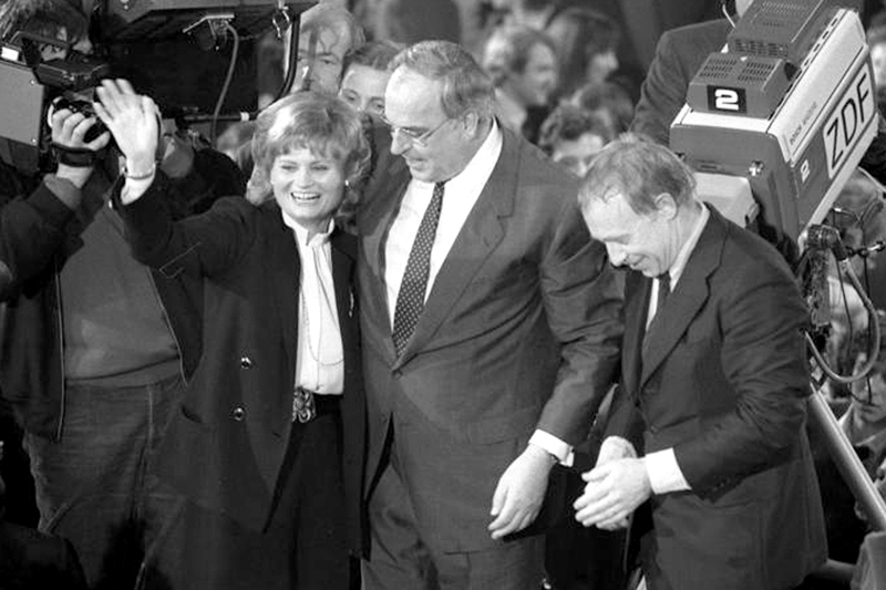 6.3.1983 Wahl